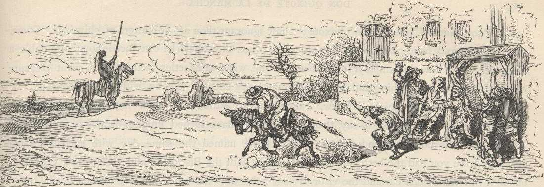 Sancho Pança abandona a estalagem indo ao encontro de Dom Quixote ao longe